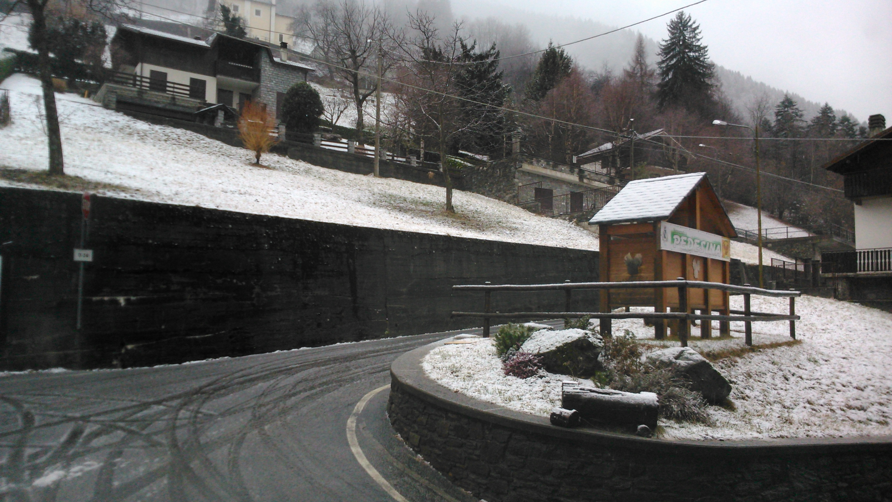 Pedesina